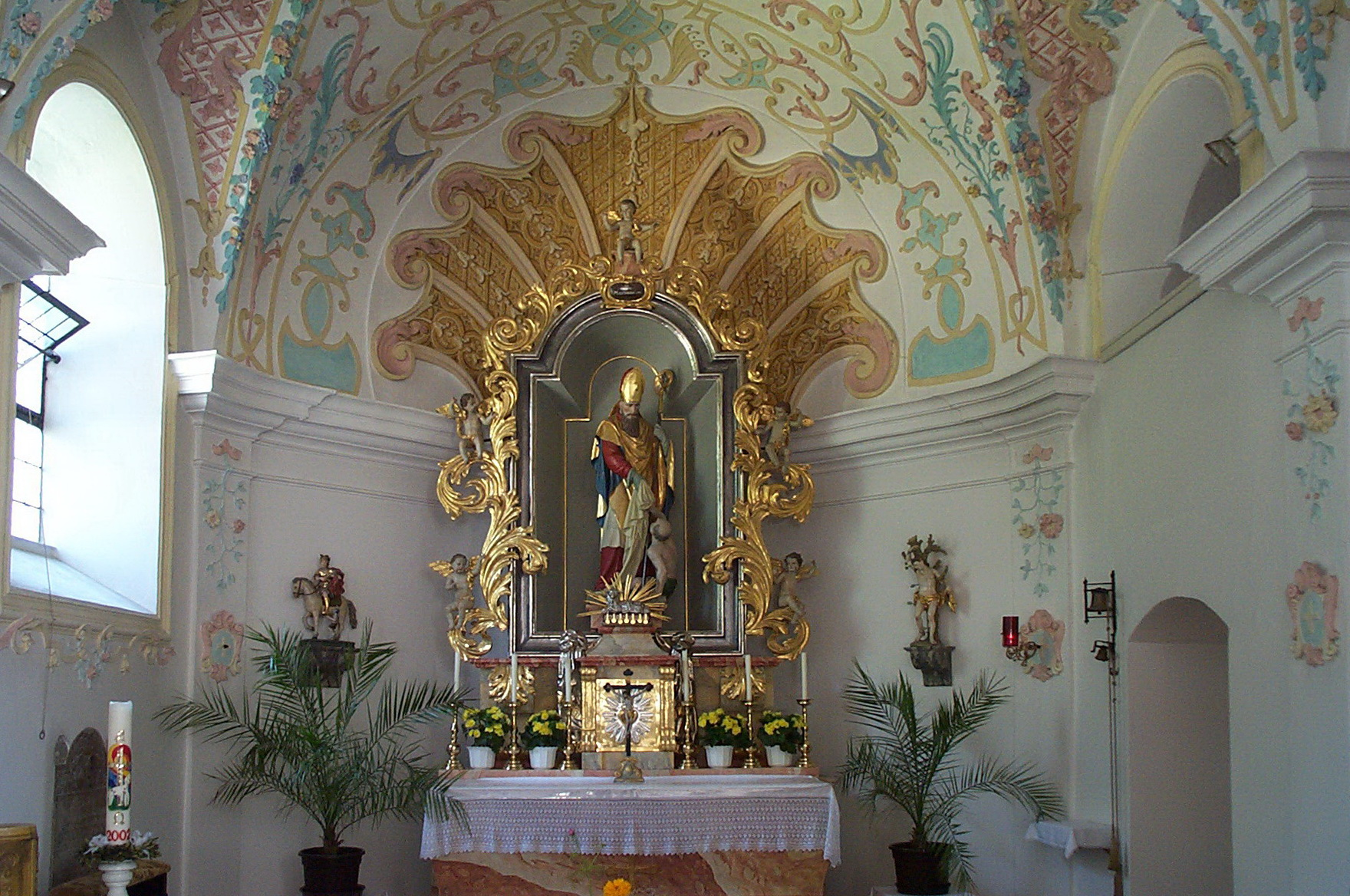 Herrngiesdorf, Bernhardstraße 23-25. Katholische Kirche St. Martin. Der Chor ist eingezogen mit einem Joch und Schluss in fünf Seiten eines Achtecks. Tonnengewölbe mit Stichkappen und Kranzgesims. Frührokokostuckaturen um 1740. Die gerundete Gwölbeschale ziert im Chorschluss eine große Muschel.